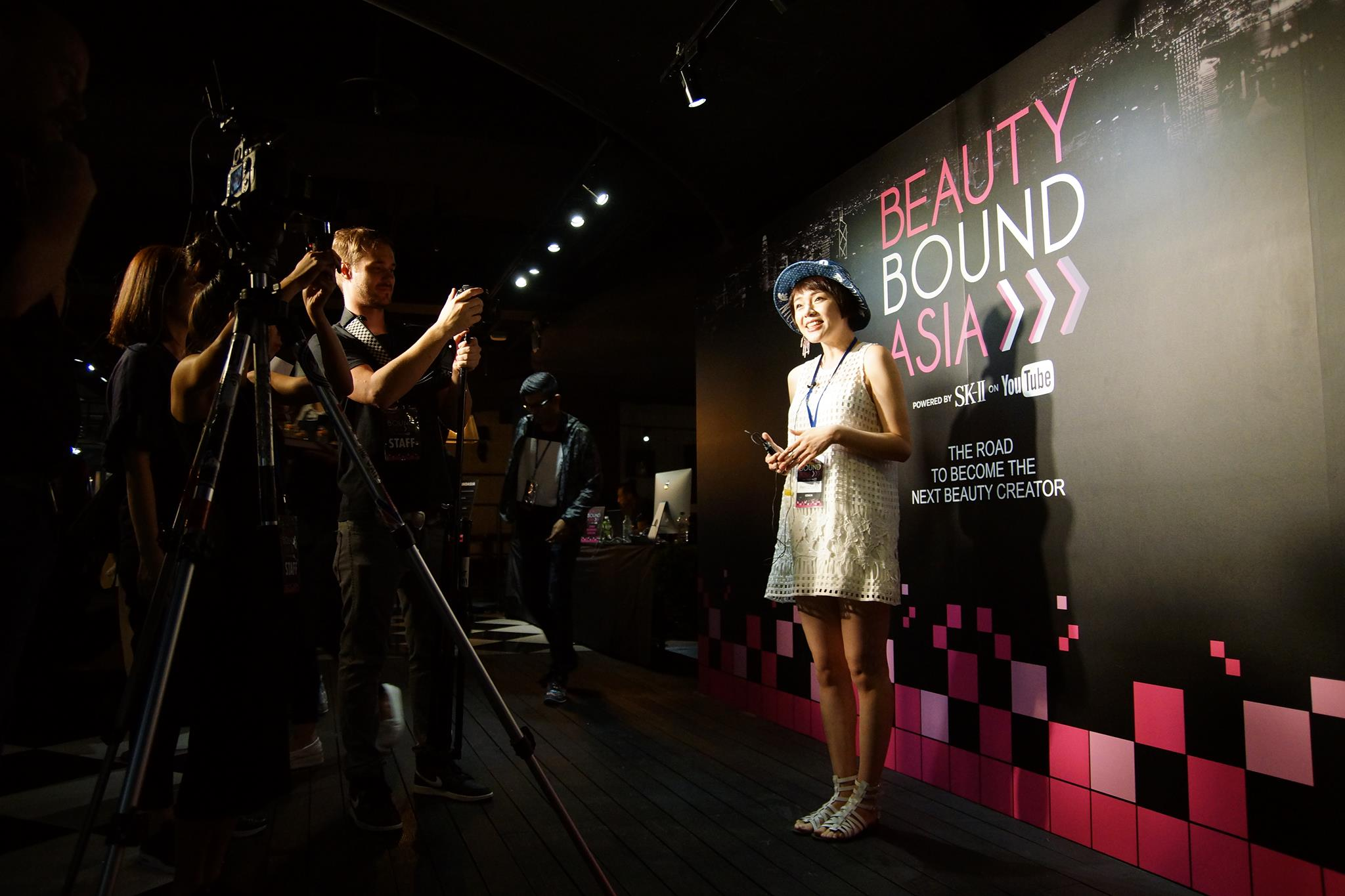 YouTube與SK-II合作的大型美妝活動Beauty Bound Asia台灣區代表評審－沛莉.jpg